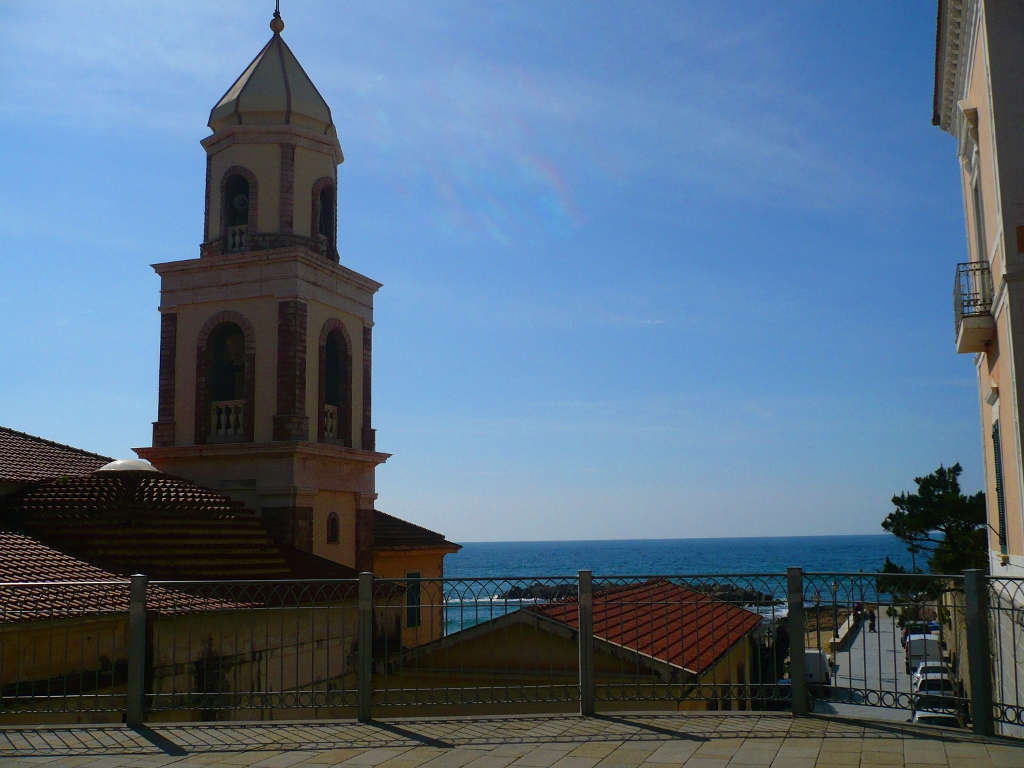 La biblioteca parrocchiale a santa maria di castellabate, annessa al santuario santa maria a mare